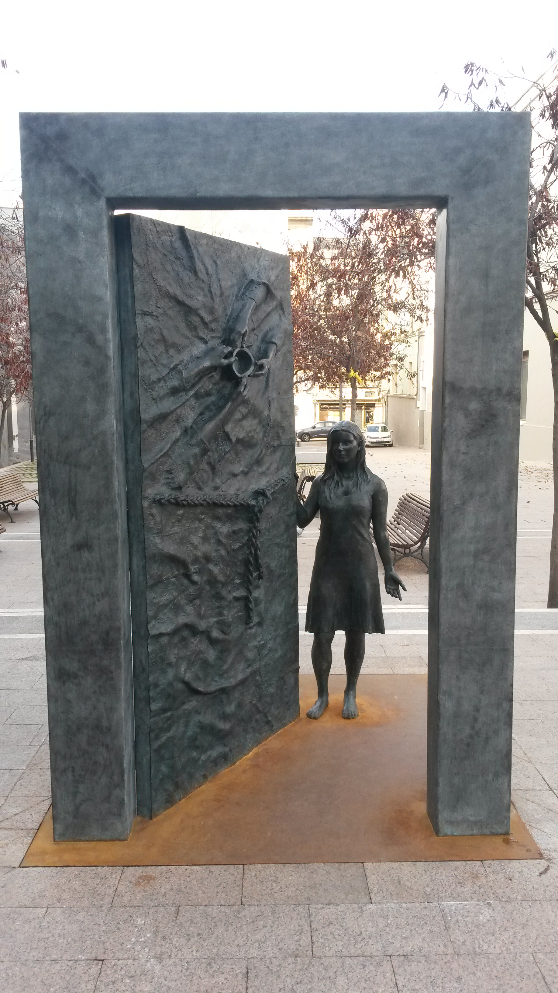 L'Acollida (2015), d'en Ramon Oms